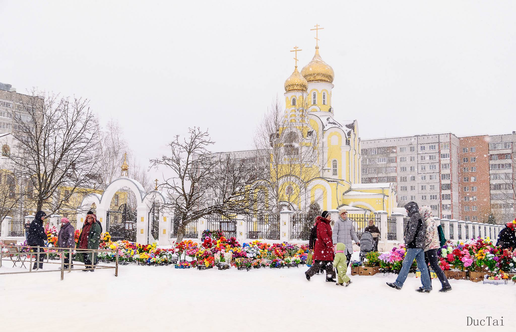 Mùa đông tại Obninsk